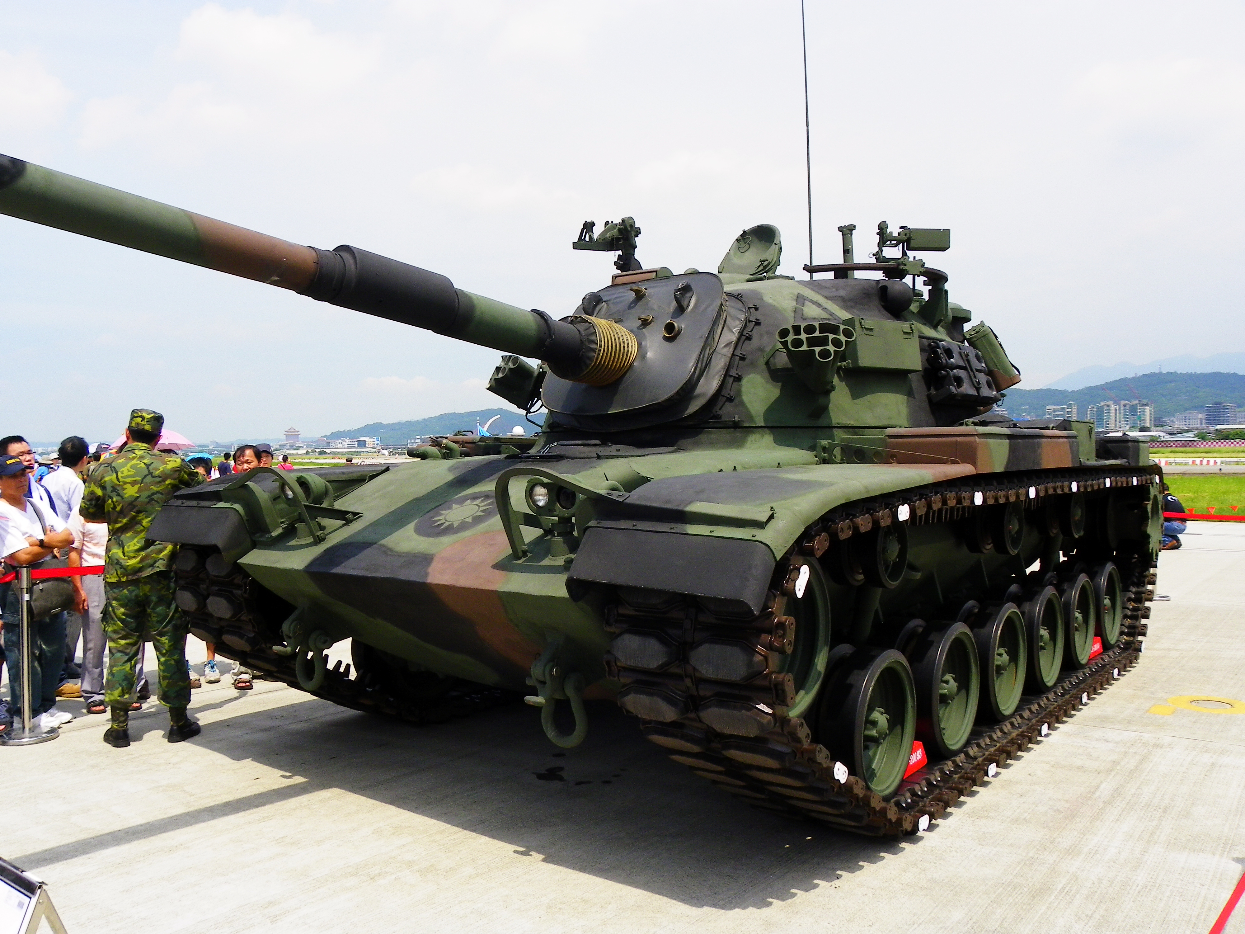 中華民國陸軍CM-11勇虎戰車，攝於2011年空軍松山基地營區開放活動。